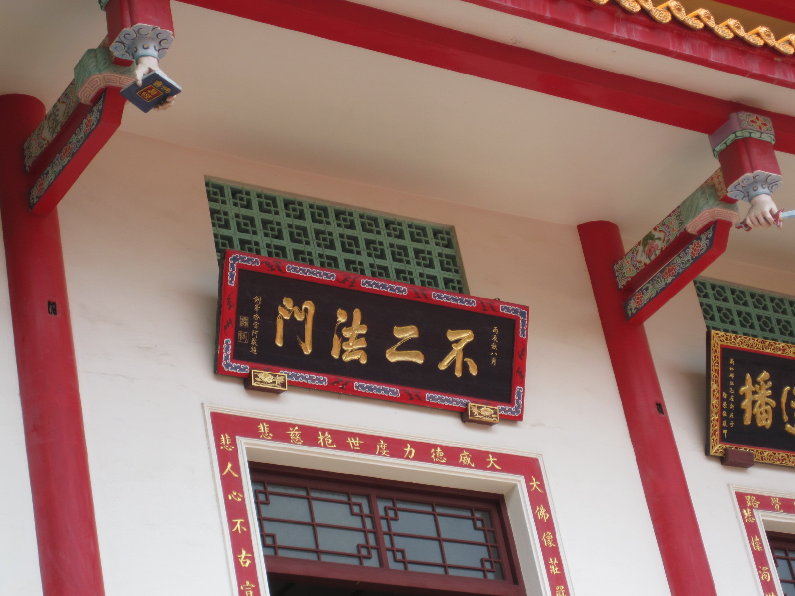 臺南開元寺不二法門匾